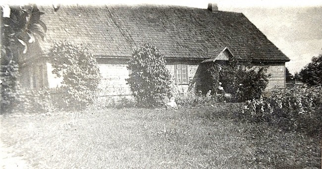 Dom mieszkalny w majątku Druck ok. 1934 r.